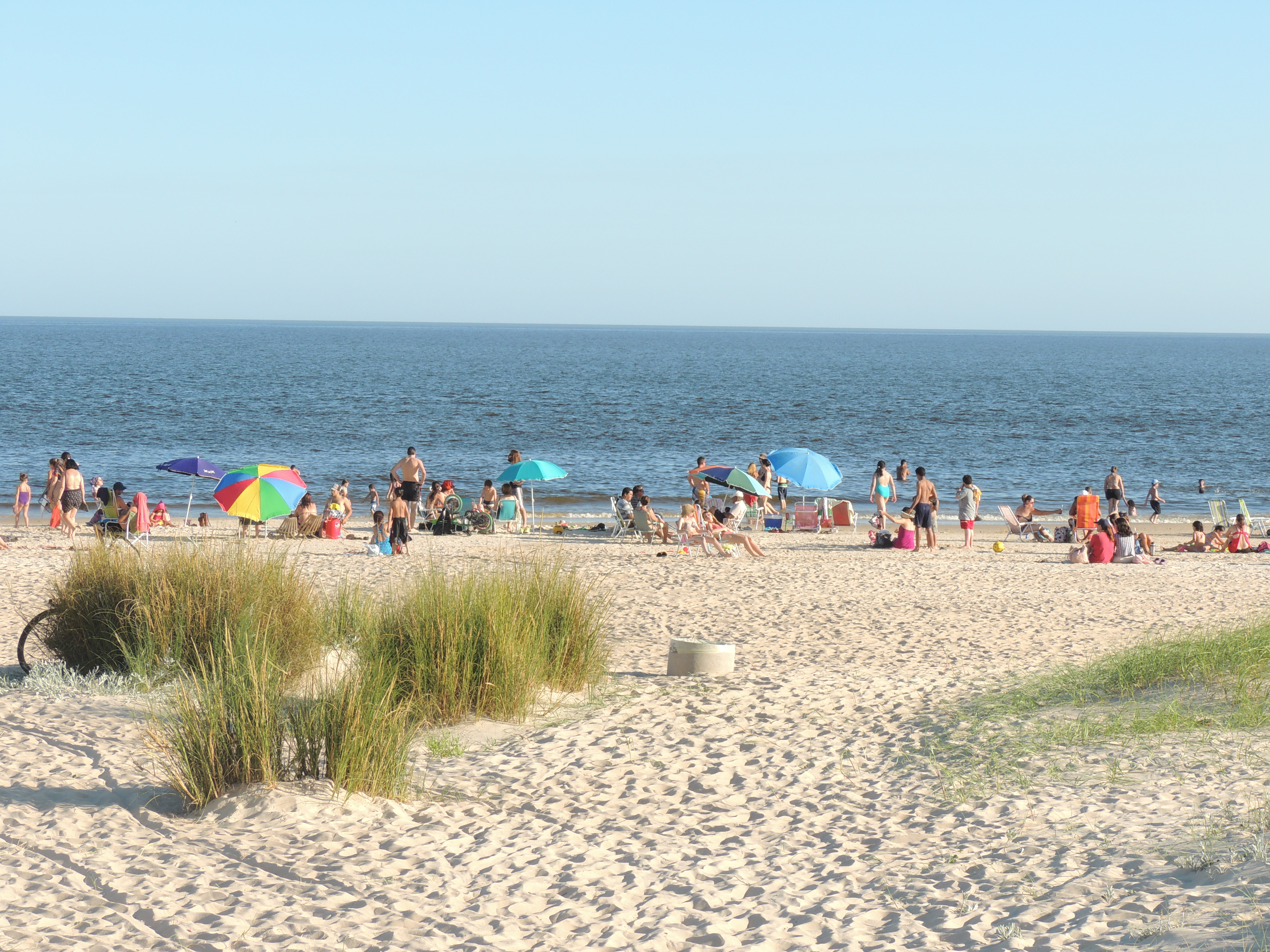 Playa de Lomas de Solymar